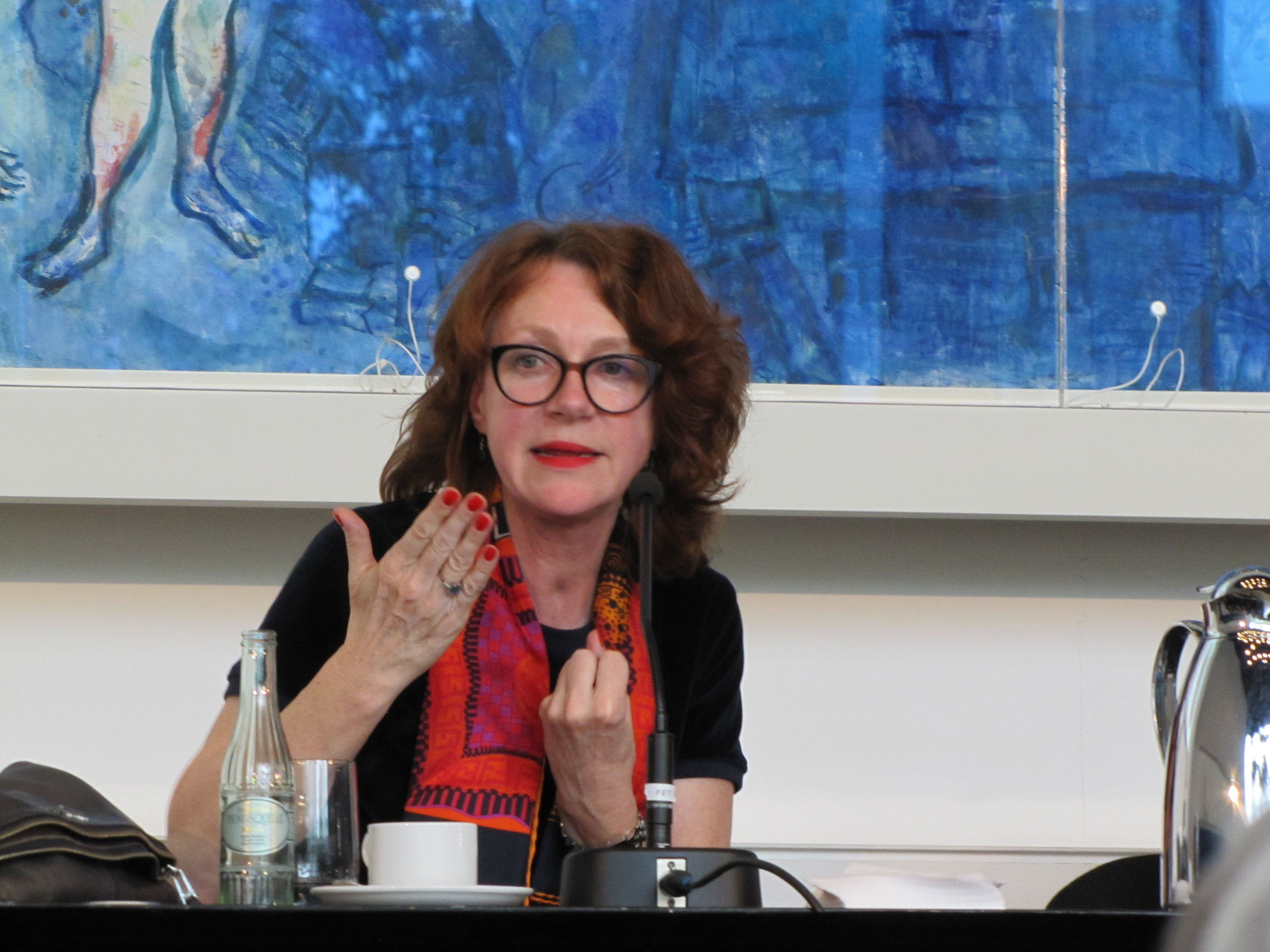 Ulrike Guérot, bei den 47. Römerberggesprächen, Thema:Last Exit nach dem Brexit Ist Europa noch zu retten?", im Mai 2019 im Chagall-Saal der Städtischen Bühnen in Frankfurt am Main.